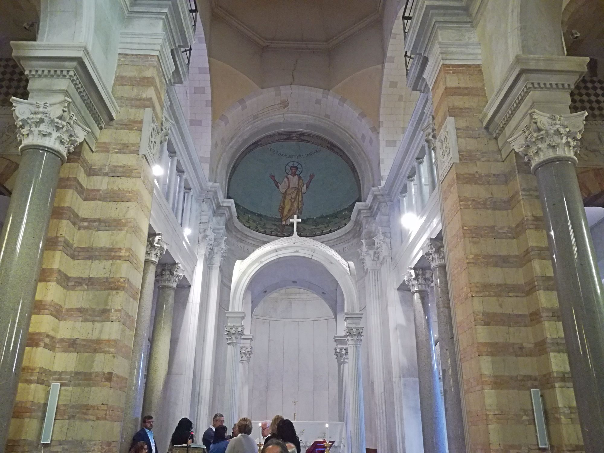 Abside Gennaro ad Antignano